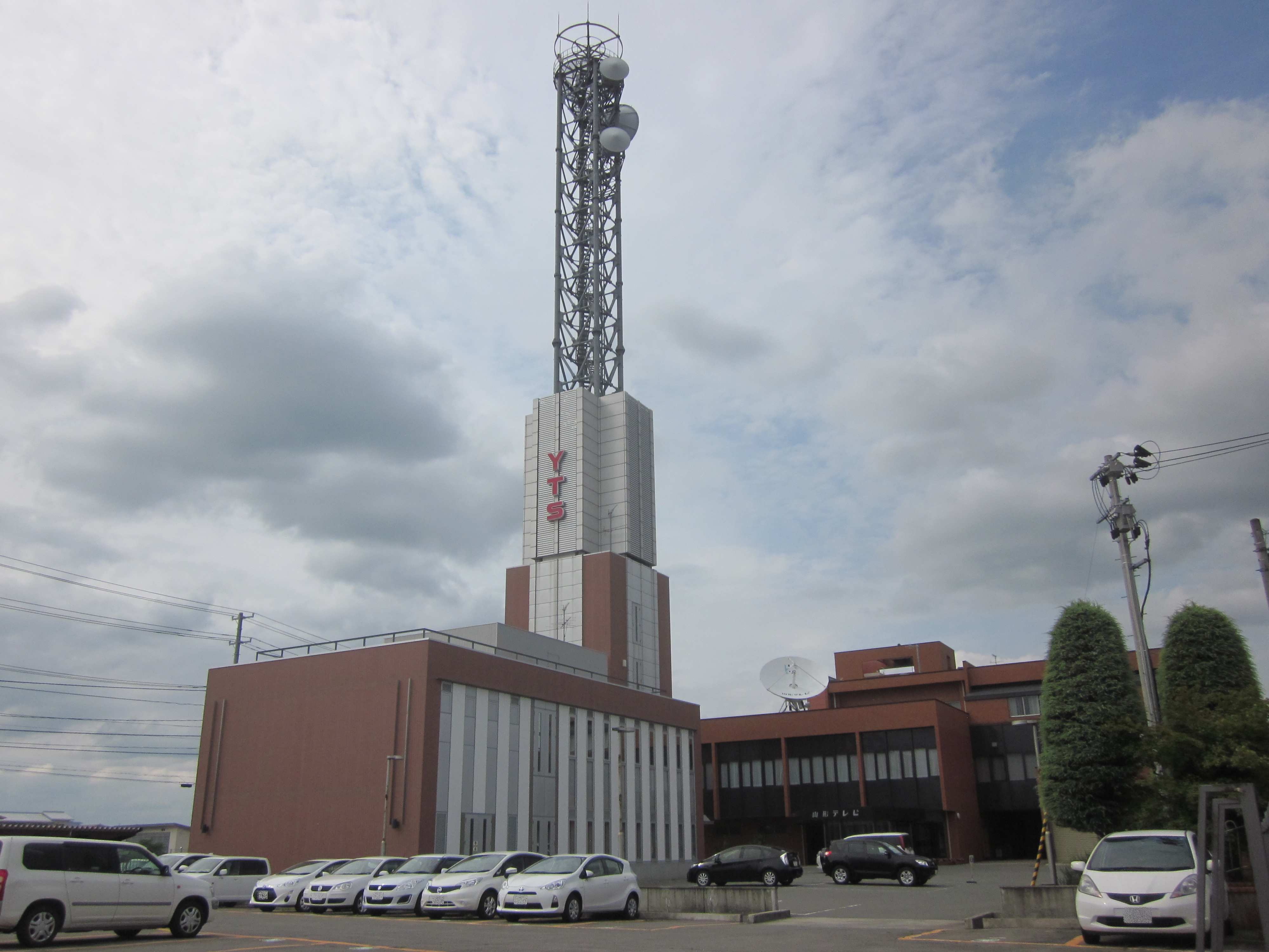 2016年7月16日、投稿者自身による撮影。アナログテレビジョン放送用送信鉄塔撤去後。